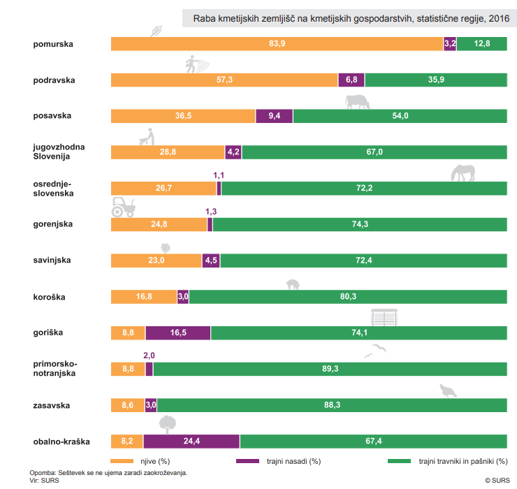 Raba kmetijskih zemljišč na kmetijskih gospodarstvih, statistične regije, 2016